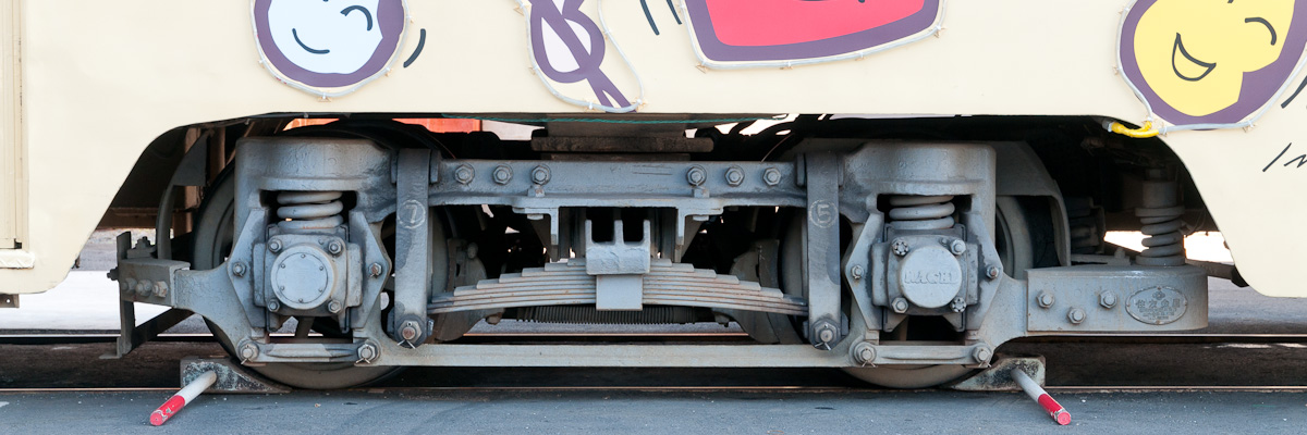 豊橋鉄道東田本線3203の住友金属製KS40J形台車。